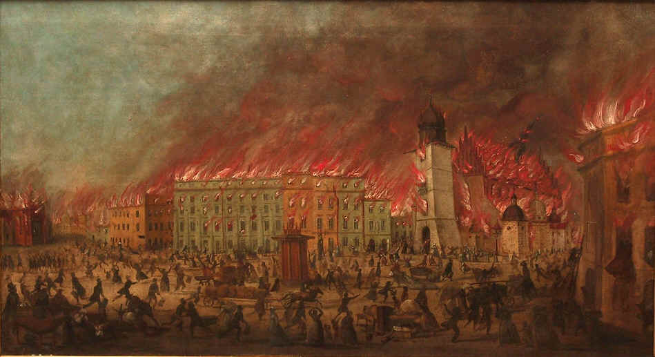 Pożar Krakowa, Rynek Główny, lipiec 1850